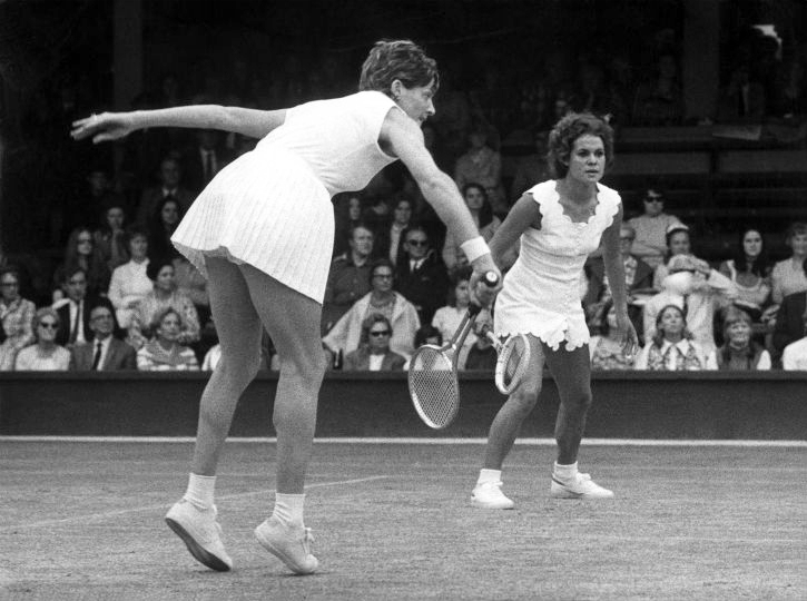 Tennis, Halve finale damesdubbel Wimbledon 1971, met Margaret Court (links) en Evonne Goolagong als winnaars. Wimbledon Londen 1 juli 1971.